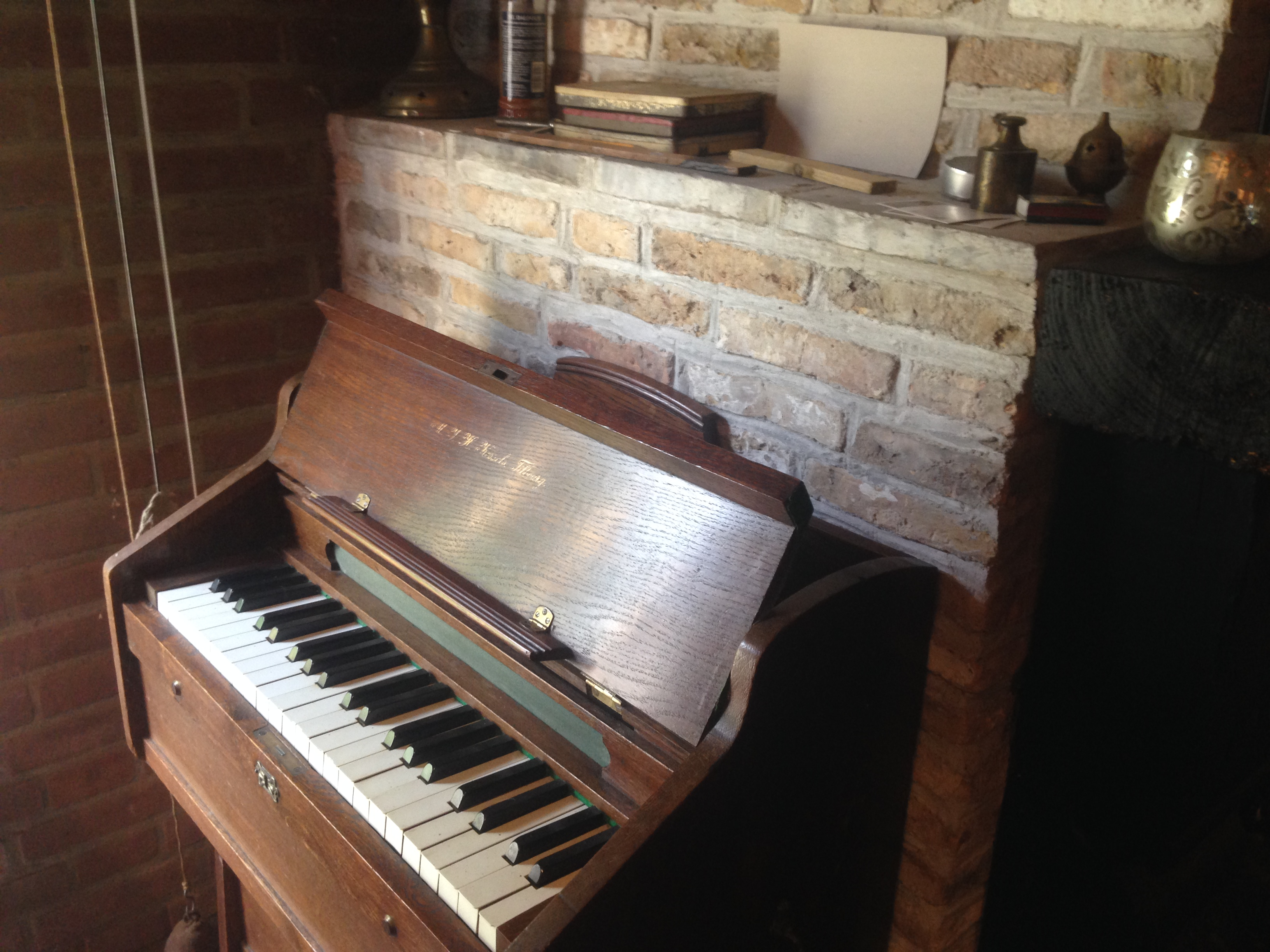 Harmonium Museum in Paasloo, Overijssel, Netherlands